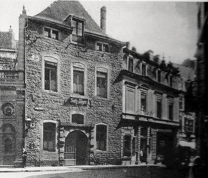 Großer (links) und kleiner (rechts) Klüppel in Aachen, Ursulinerstraße (früher Aldegundisstraße)